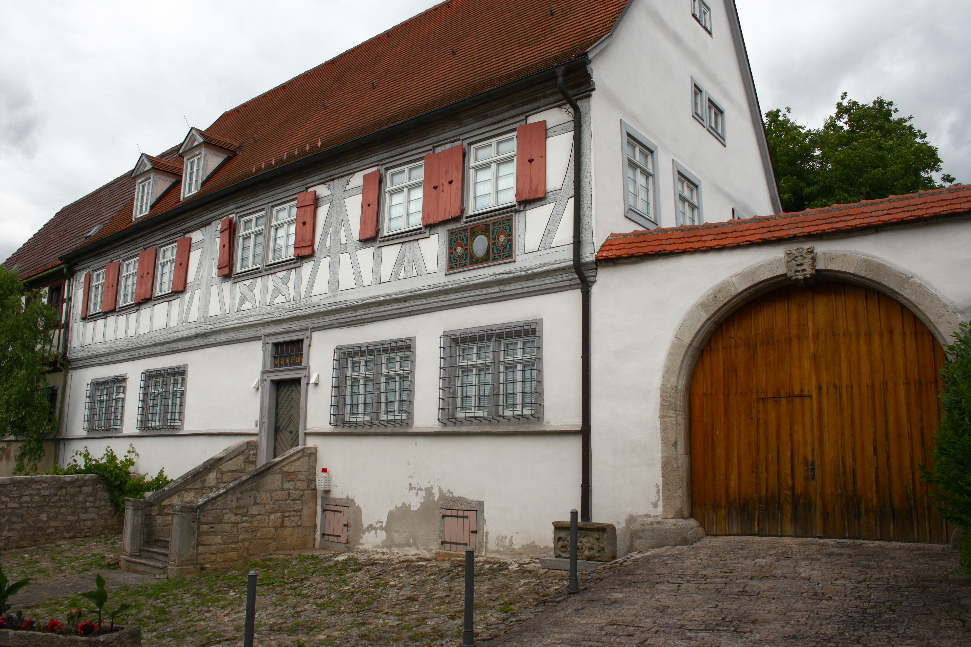 Museum in Grünsfeld im Main-Tauber-Kreis (Baden-Württemberg), Schloßstraße 7